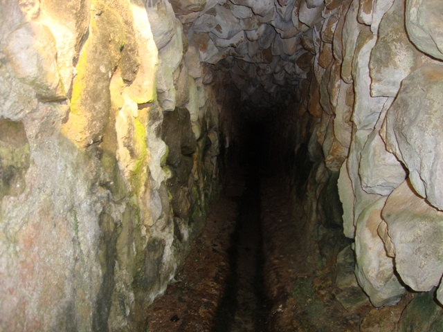 Galeria del qanat d'Albenya, al municipi d'Algaida (Mallorca)